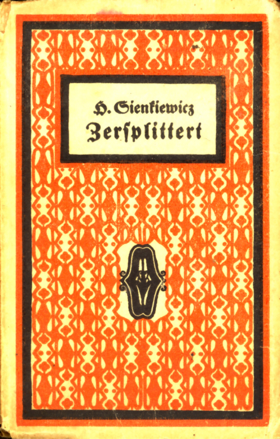 Heinrich Sienkiewicz, Zersplittert. Leipzig: Reclam, 1918